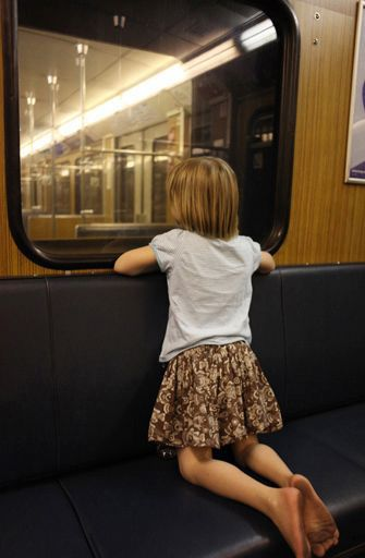 Untergrund